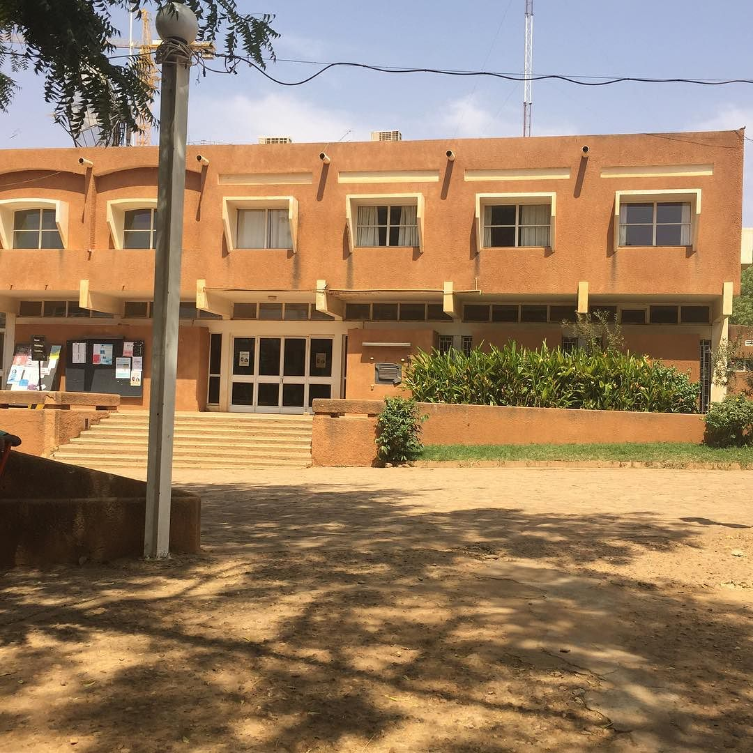 via Instagram ift.tt/2kDTMFc